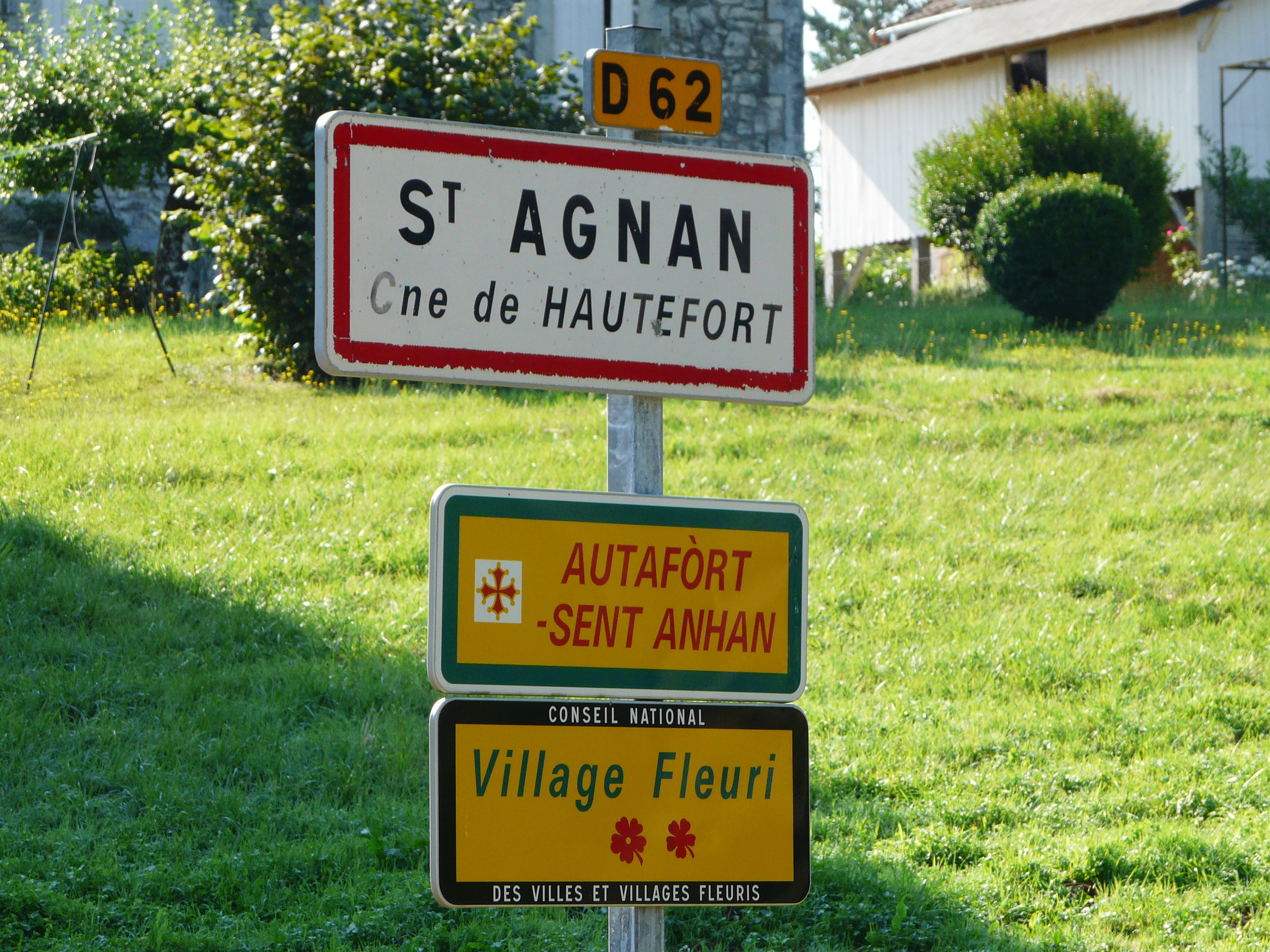 Sur la route départementale 62, panneau bilingue français-occitan d'entrée à Saint-Agnan (commune de Hautefort), Dordogne, France.